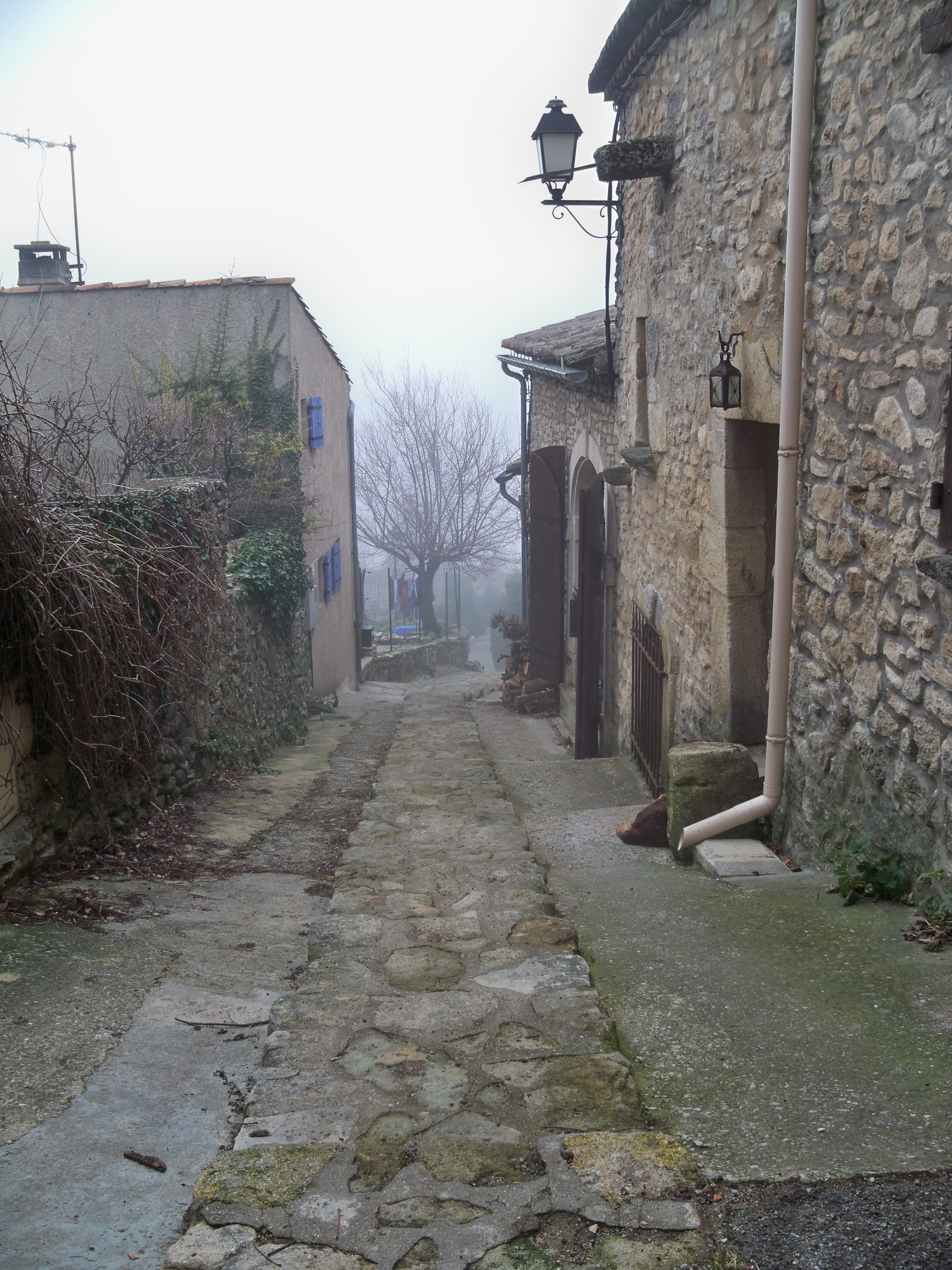 Calade à Auribeau (84)